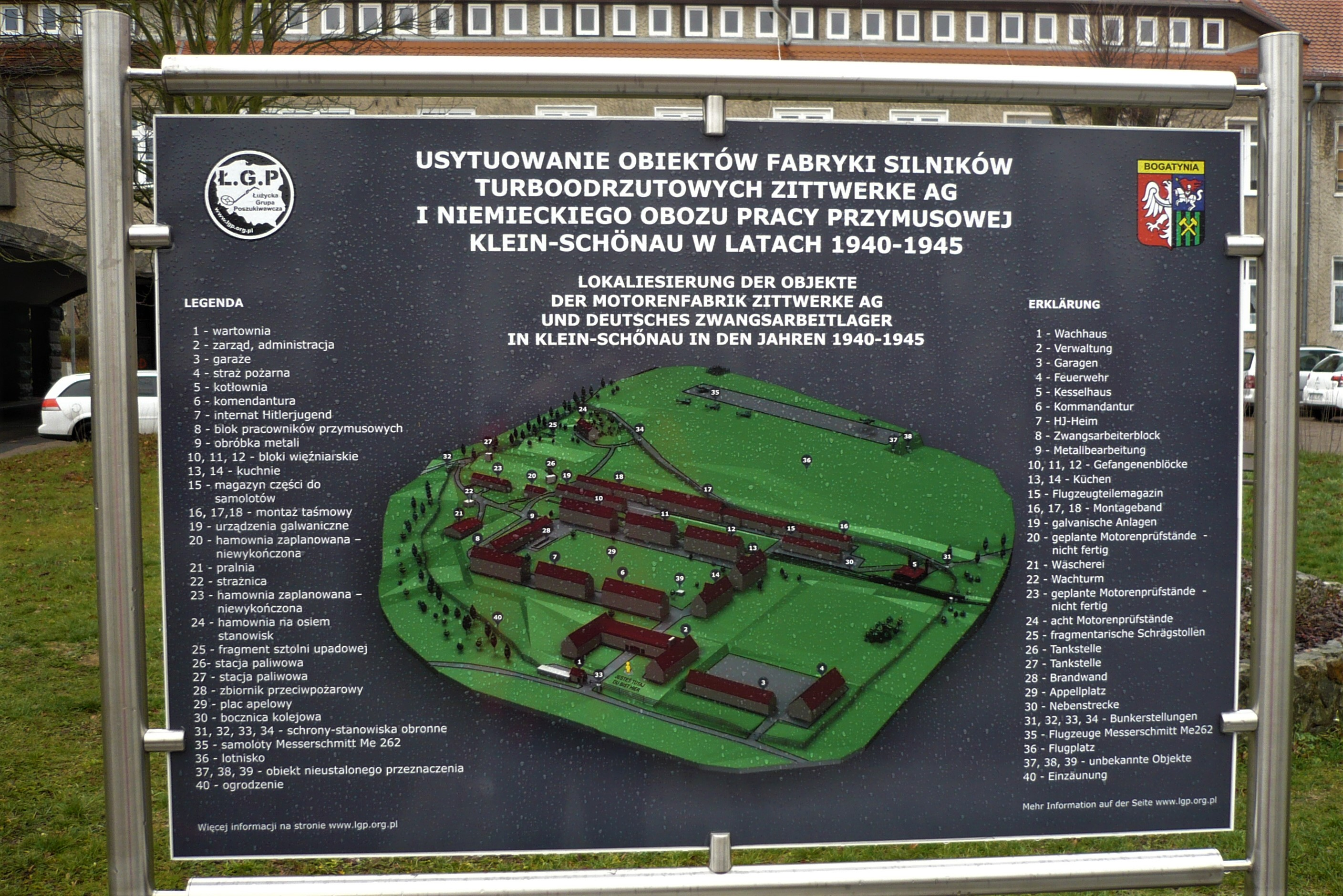 Sieniawka tablica